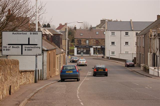 Crossgates